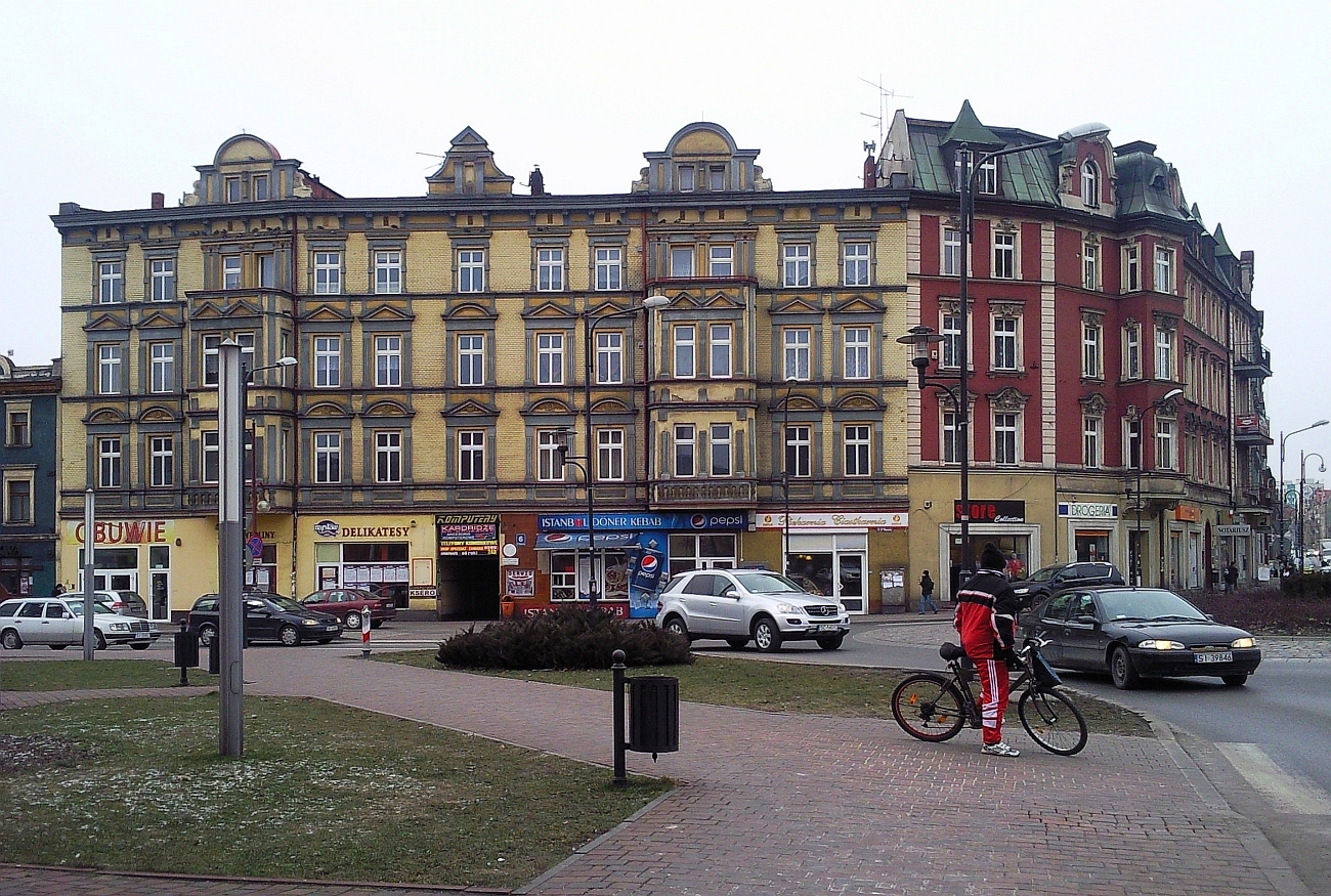 Kamienica przy ulicy 27 Stycznia w Siemianowicach Śląskich.